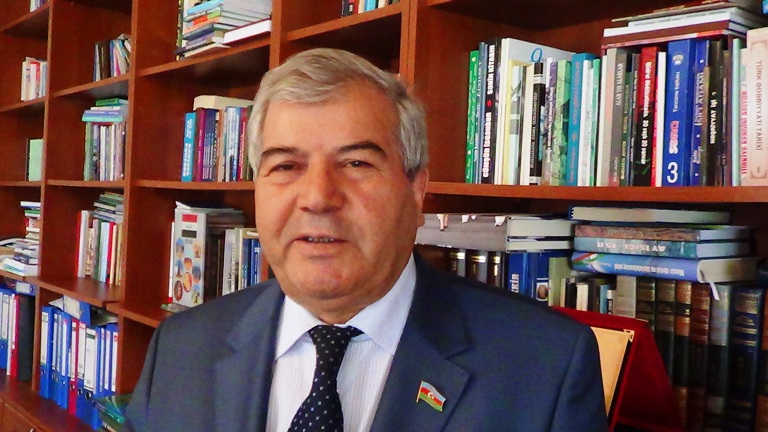 Vətəndaş Həmrəyliyi Partiyasının sədri, dünya Azərbaycanlıları Konqresinin həmsədri Milli Məclisin deputatı Sabir Rüstəmxanlı